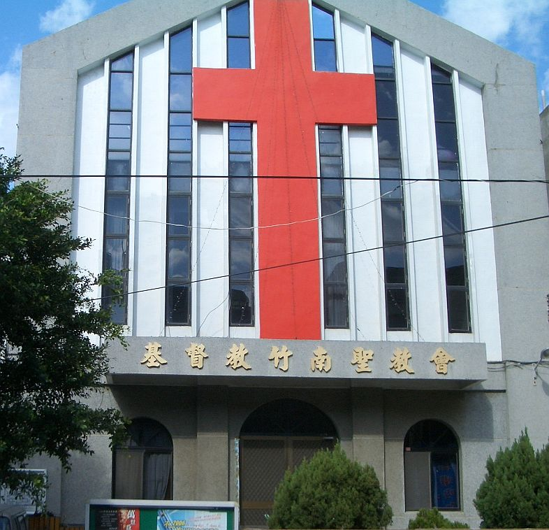 竹南聖教會外觀